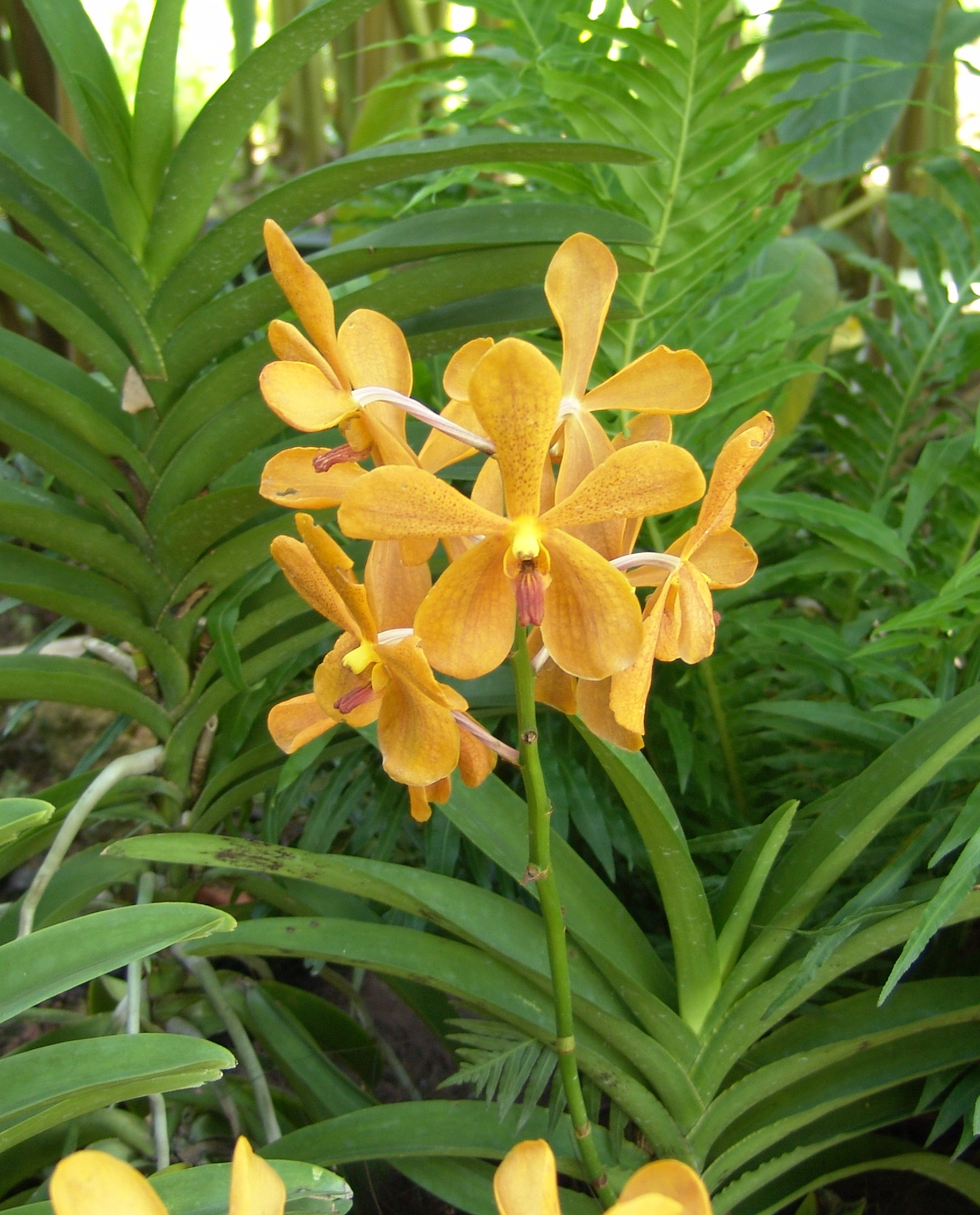 Singapore Botanical Garden